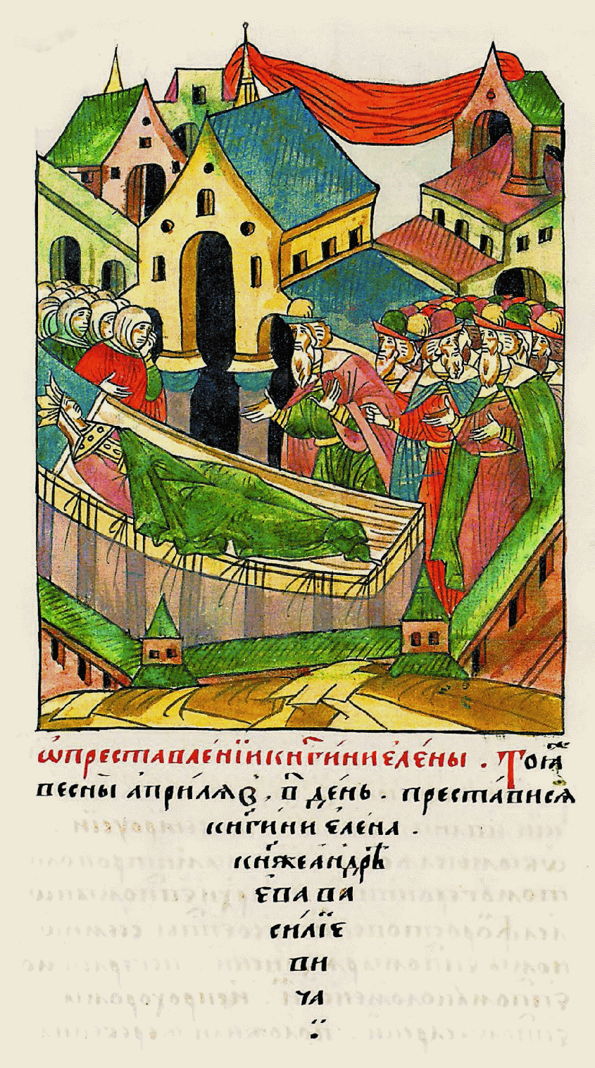 О кончине княгини Елены. В ту же вес- ну апреля во 2 день скончалась княгиня Елена, супруга князя Андрея Васильевича.